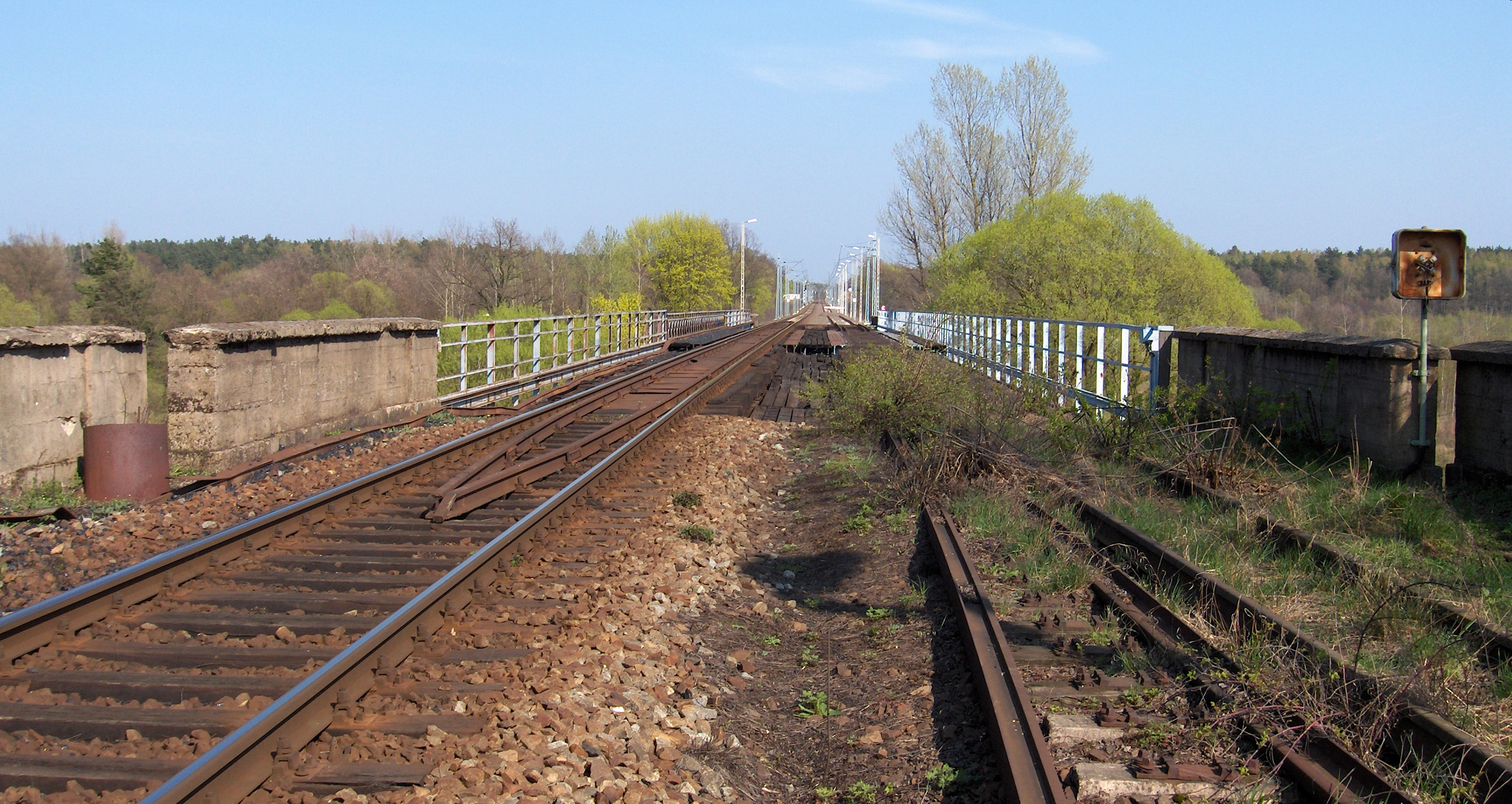 Bahnbrücke über die Neiße in Zentendorf, Blickrichtung Ost, in Polen ist bereits die Strecke saniert und elektrifiziert